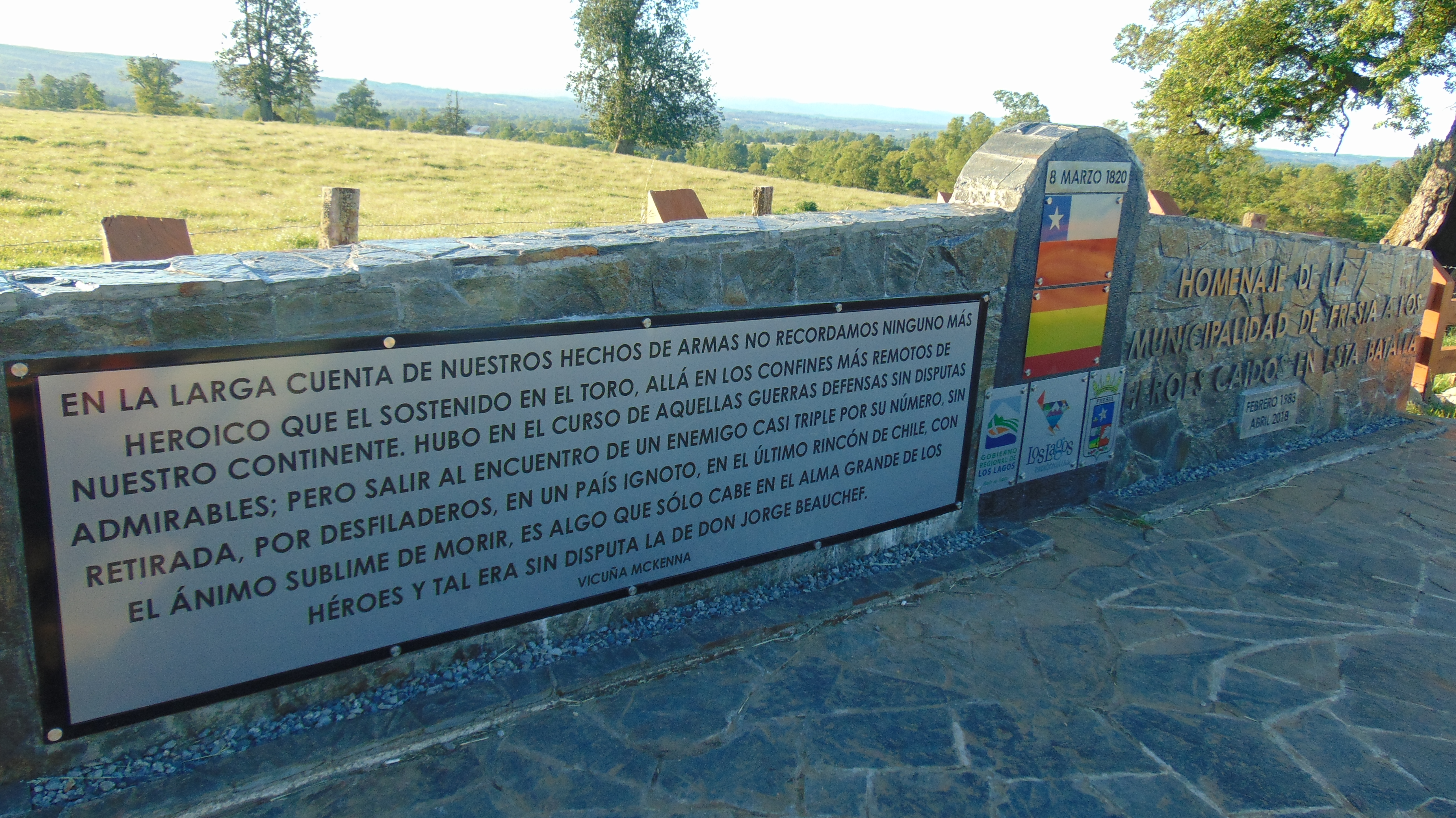 Monumento de la batalla de El Toro, 6 de Marzo 1820, guerra de la independencia de Chile (Restaurado 2018)